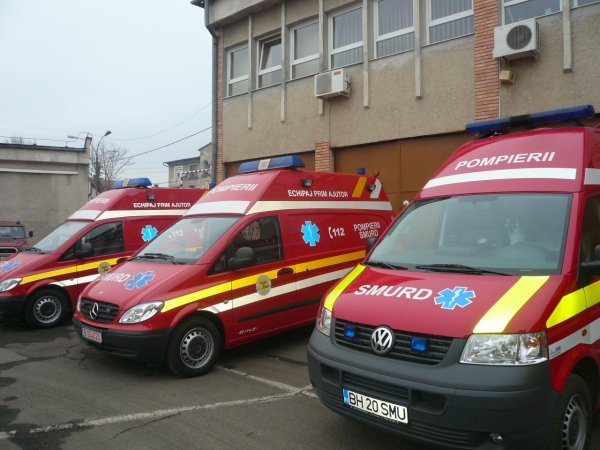 smurd ambulances